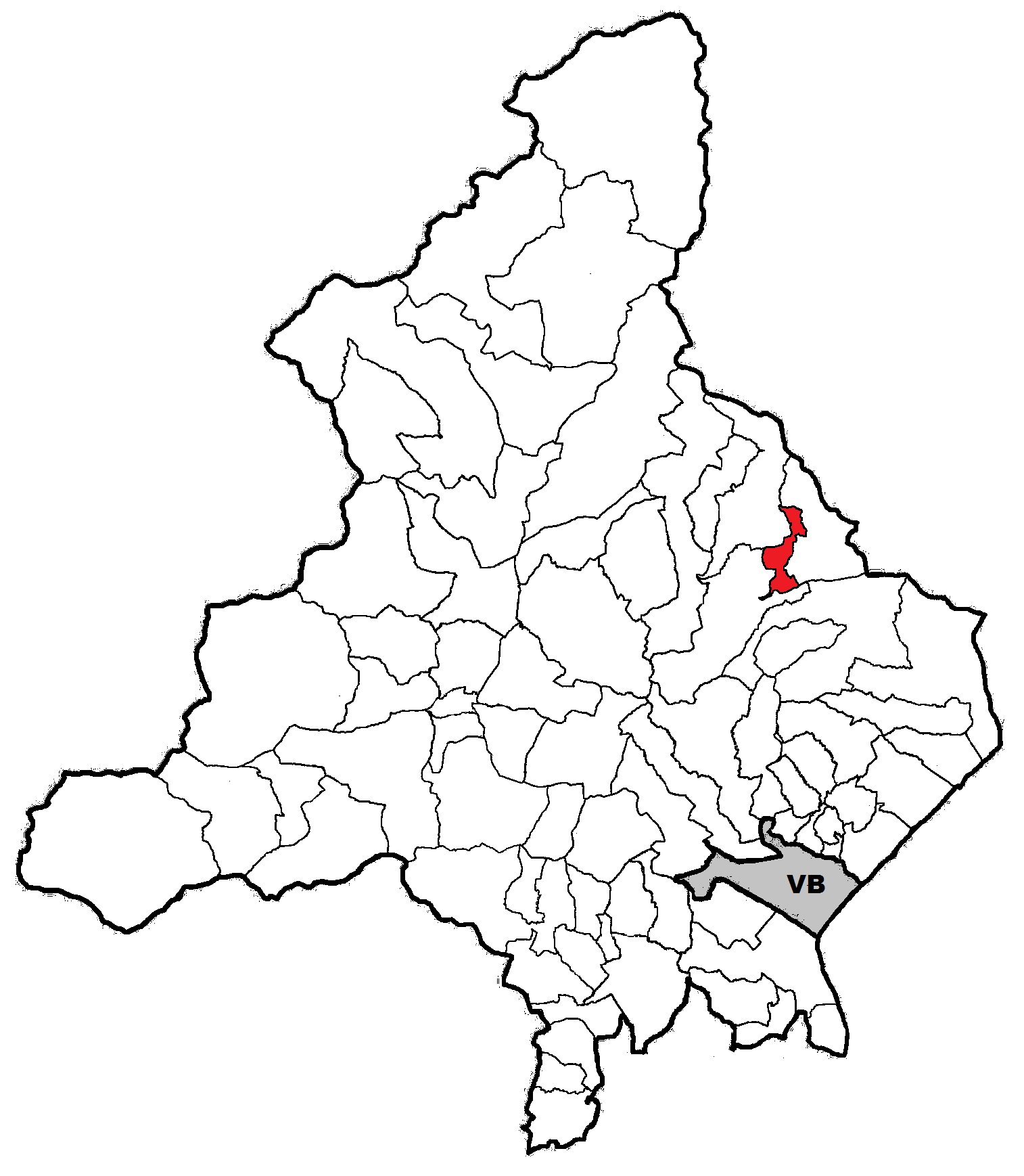 Posizione del comune nella provincia del Verbano Cusio Ossola (Verbania)